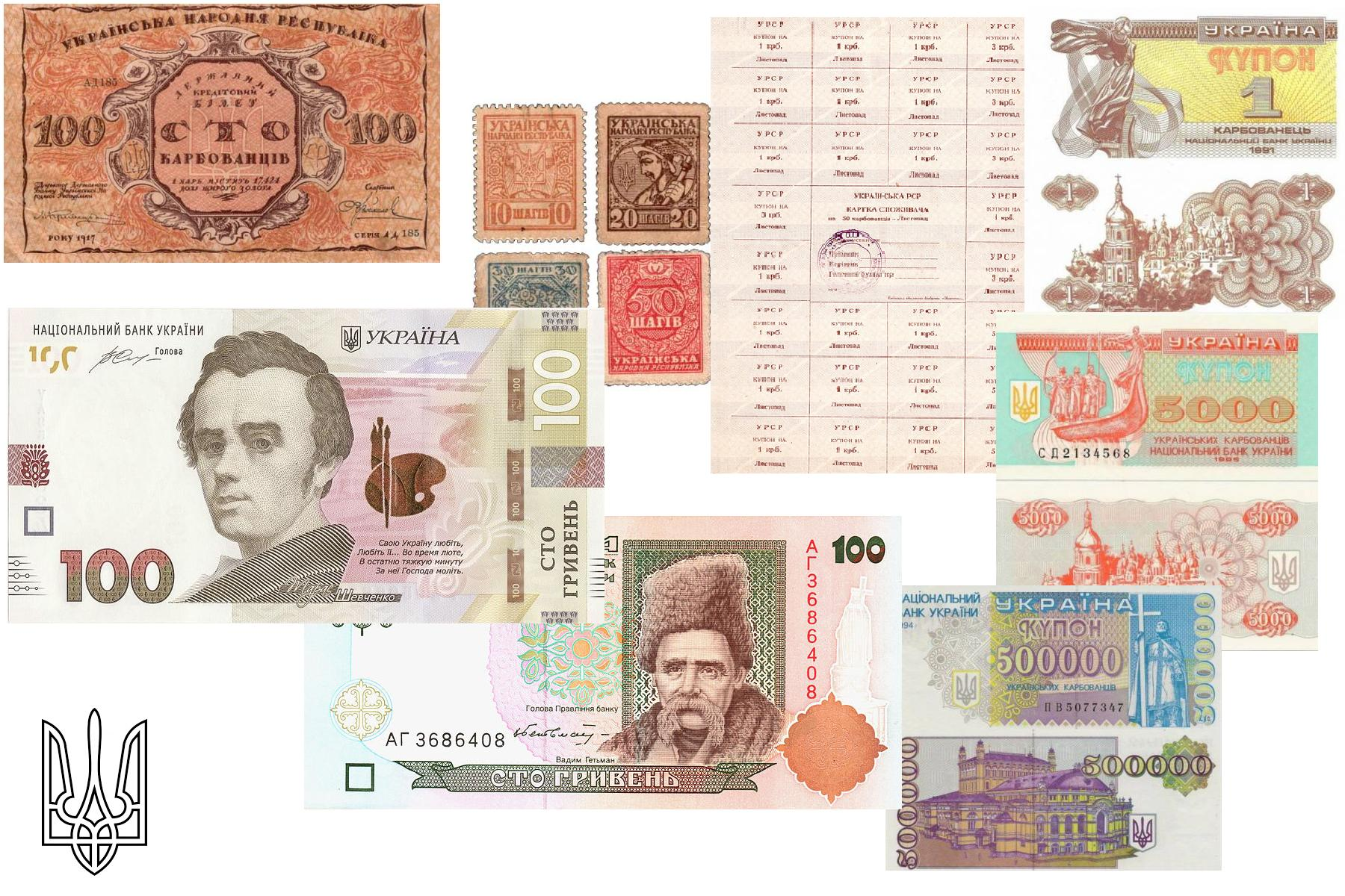 Часть истории денег Украины